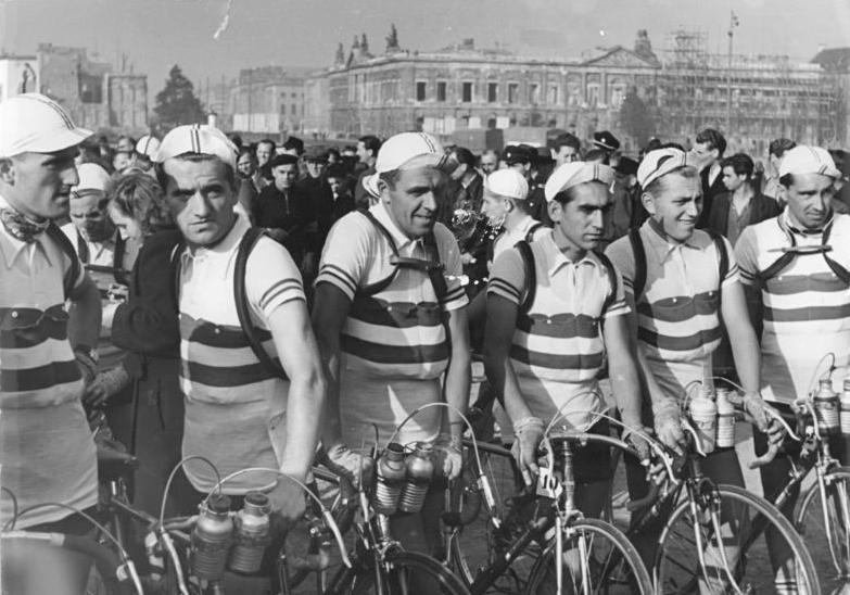 Friedensfahrt, Berlin, Teilnehmer Illus Martin 3.10.51 "Friedensfahrt der Nationen" gestartet Die Radrundfahrt durch die DDR, "Friedensfahrt der Nationen", begann am 3.10.51 am Start und Ziel auf dem Marx-Engels-Platz in Berlin. An der Rundfahrt nahmen namhafte internationale Radrennfahrer teil. UBz: Die Fahrer vor der Fahrt. Leihweise Illus Berlin WS